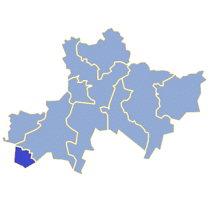 Powiat żagański - Gmina Miejska Gozdnica